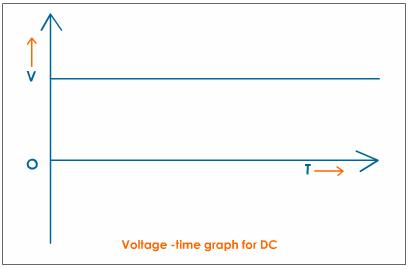 Rryma e vazhduar